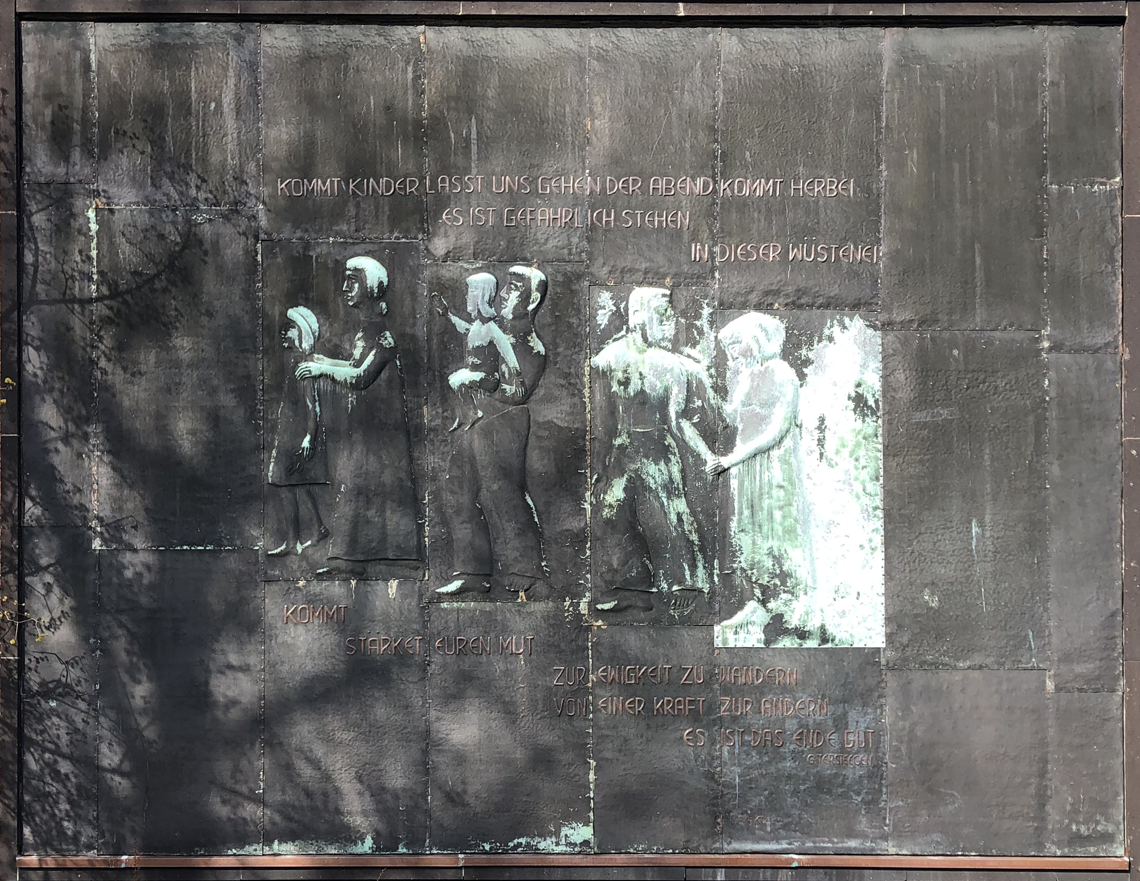 Relief vom Bildhauer Herbert Kühn mit dem Liedtext „Kommt, Kinder lasst uns gehen der Abend kommt herbei, es ist gefährlich stehen, in dieser Wüstenei, kommt stärket euren Mut, zur Ewigkeit zu wandern, von einer Kraft zur andern“ an der Tersteegen-Kirchengemeinde, Jung-Stilling-Straße, Düsseldorf-Golzheim